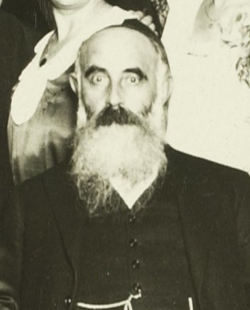 Groepsfoto ter gelegenheid van het 90-jarig bestaan van de synagoge. Op de voorste rij in het midden rabbijn Simon Philip de Vries, naast hem zijn vrouw.